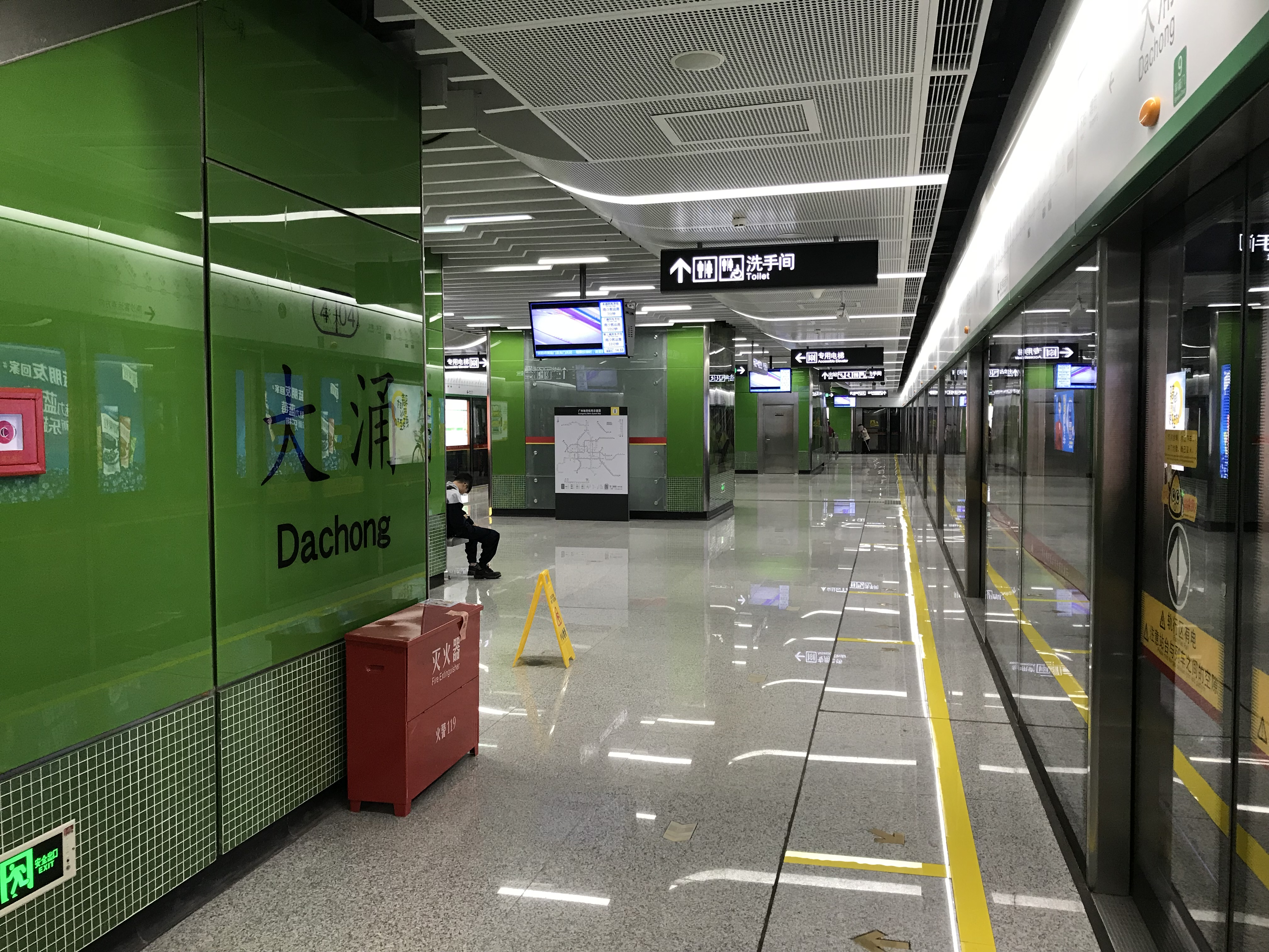 广州地铁大涌站